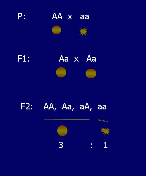 аутор Снежана Трифуновић